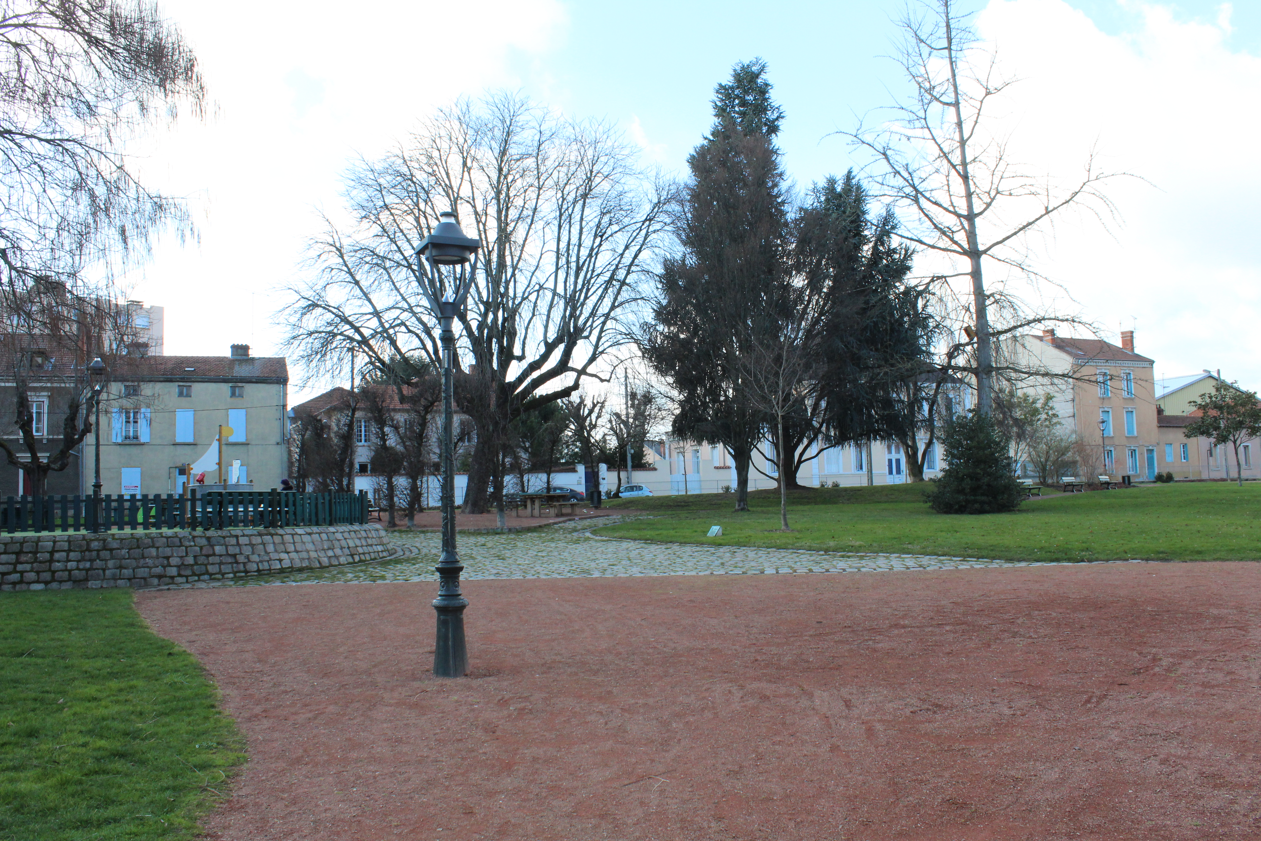 Place Baron-du-Marais, Roanne.